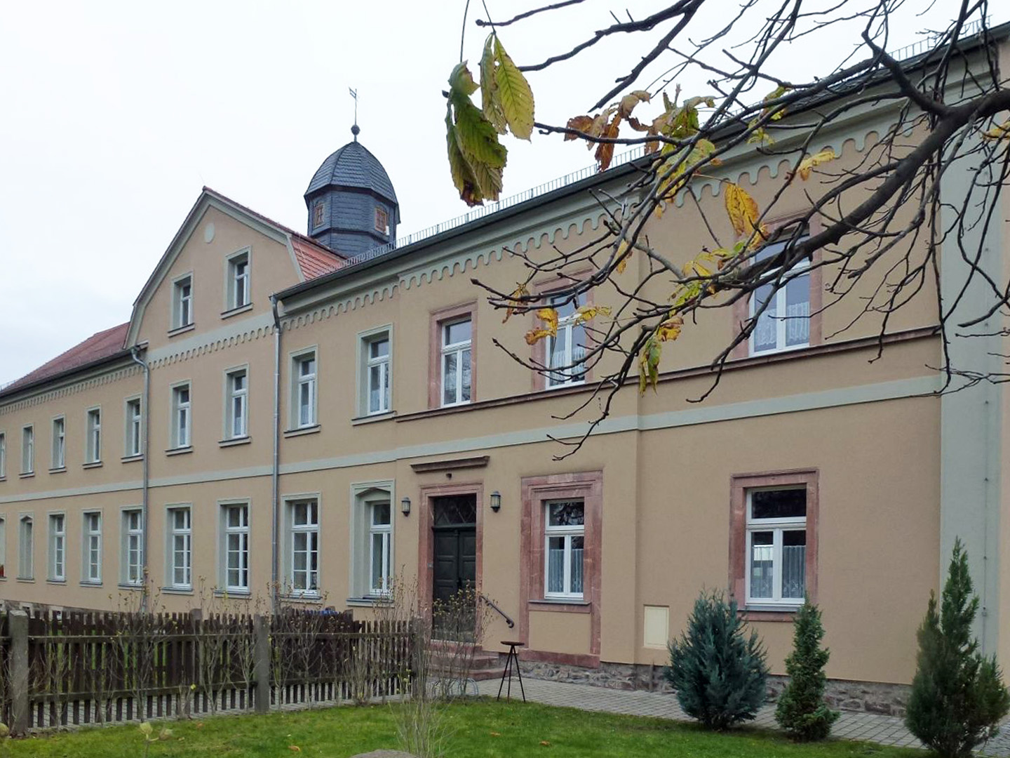 Ehem. Schule in Pomßen